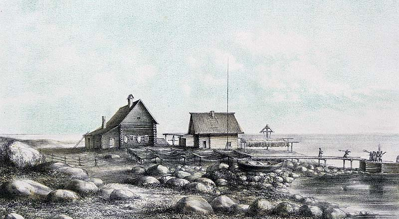 Остров Малая Муксалма.